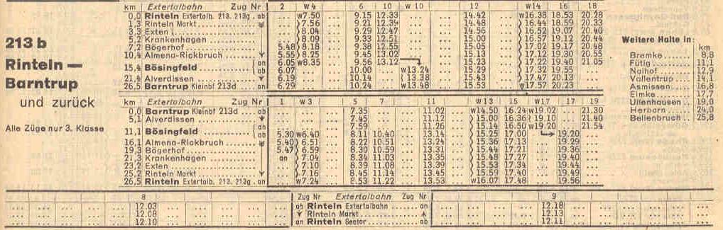 Fahrplan der Extertalbahn von 1944, Auszug aus dem Reichsbahn-Kursbuch von 1944